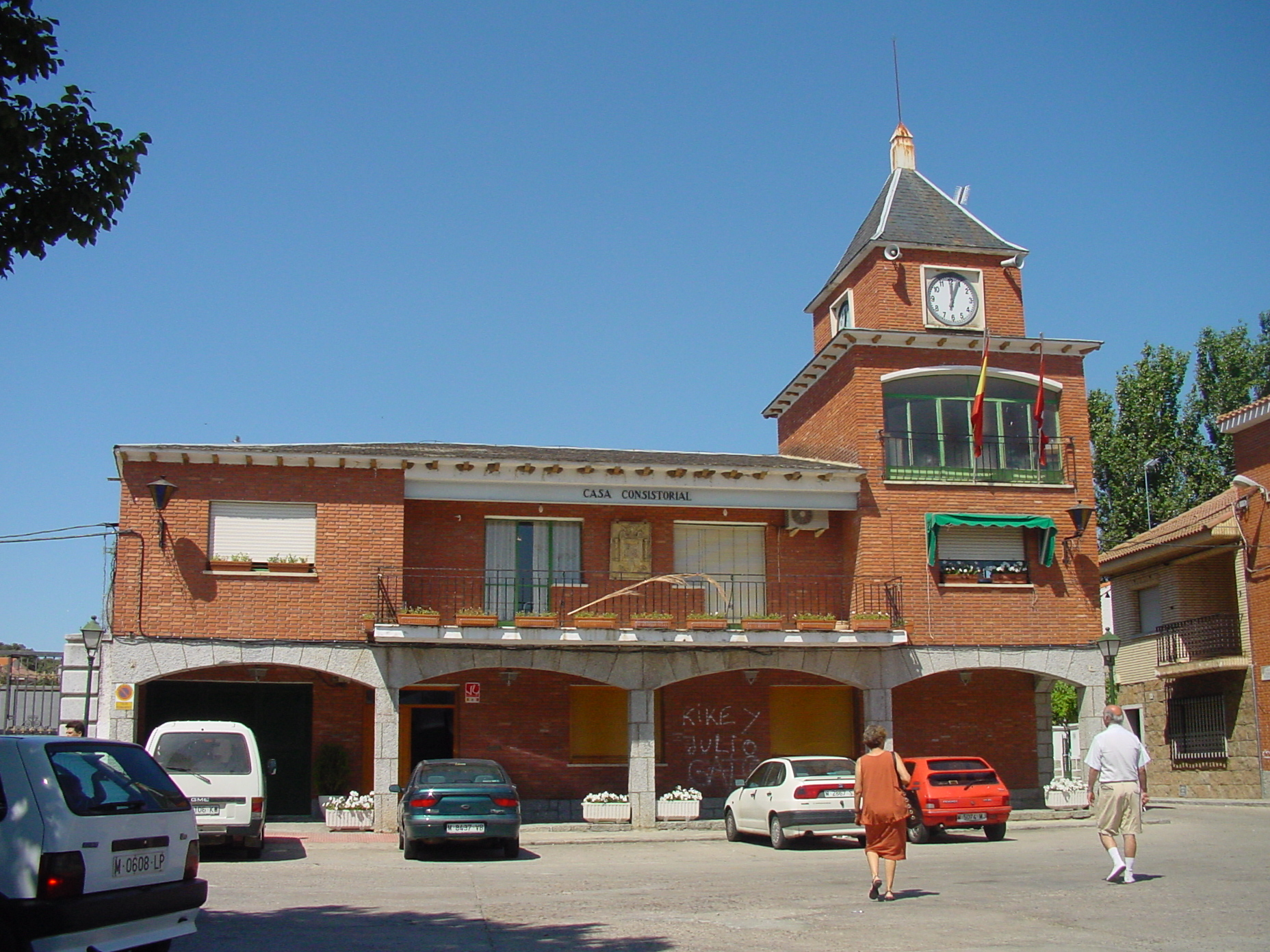 Ayuntamiento de Colmenar del Arroyo en 2002, posteriormente remodelado y reconstruido entero.